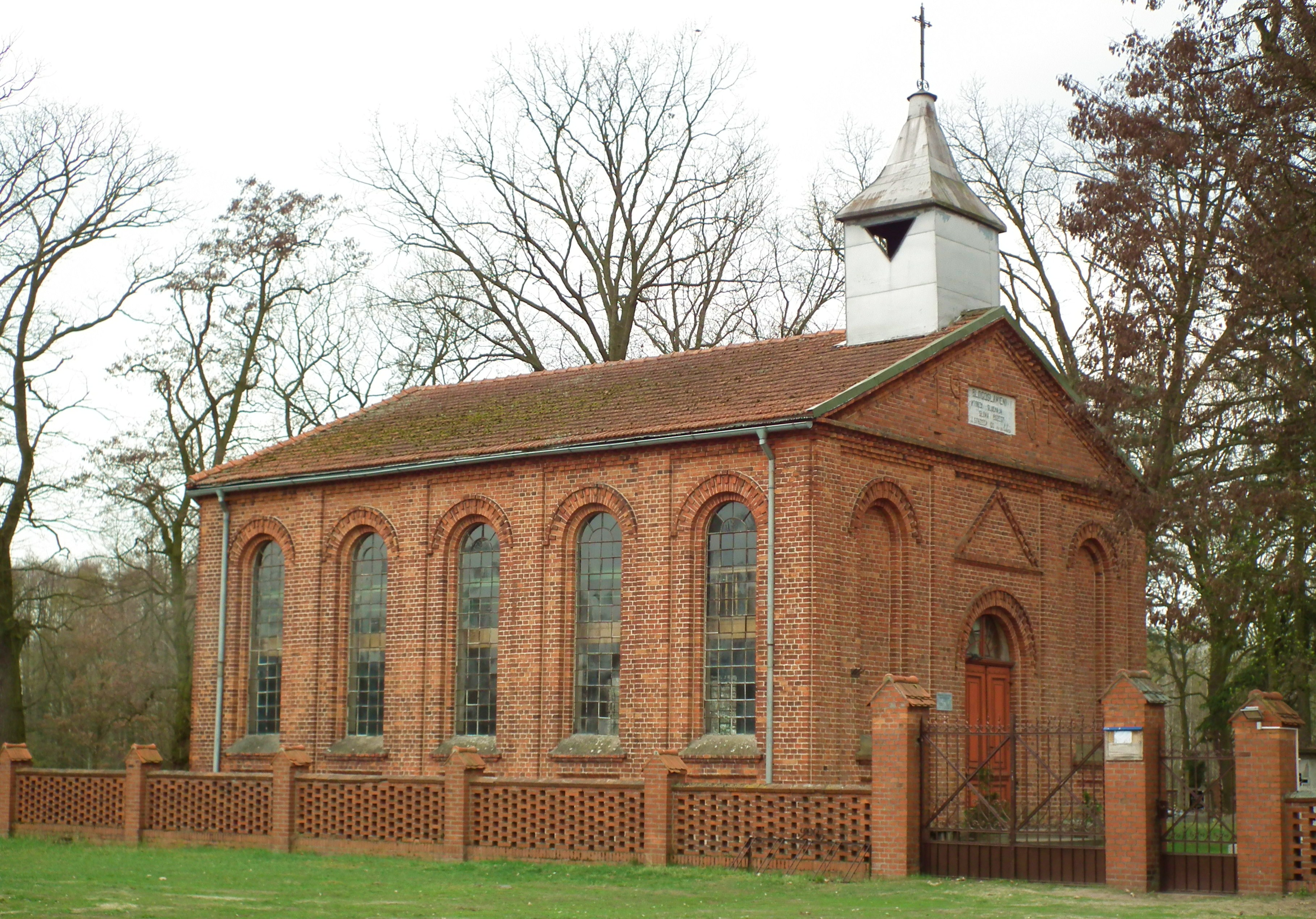 Kościół ewangelicki w Nowej Kaźmierce.